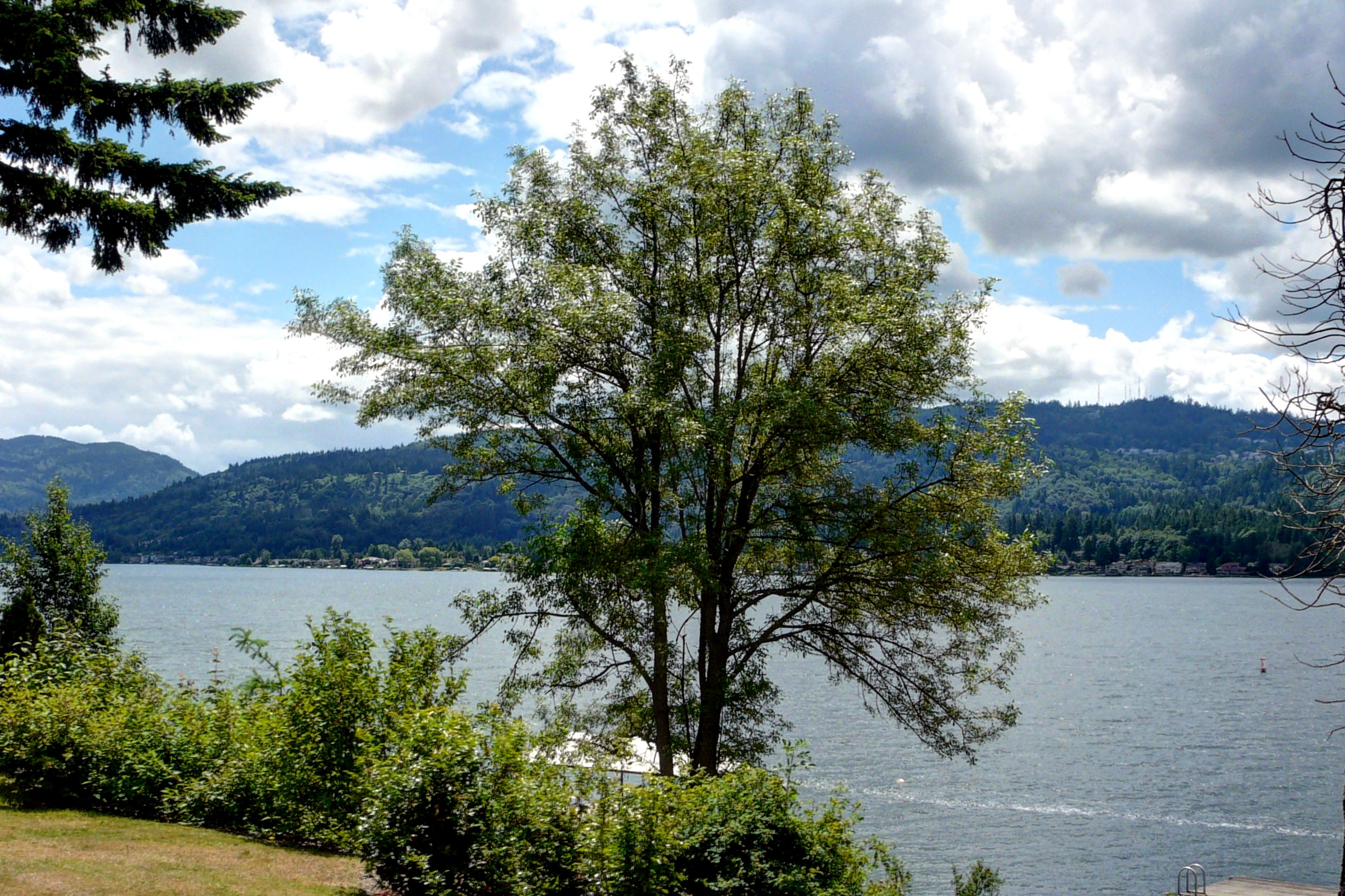 Lac sammamish